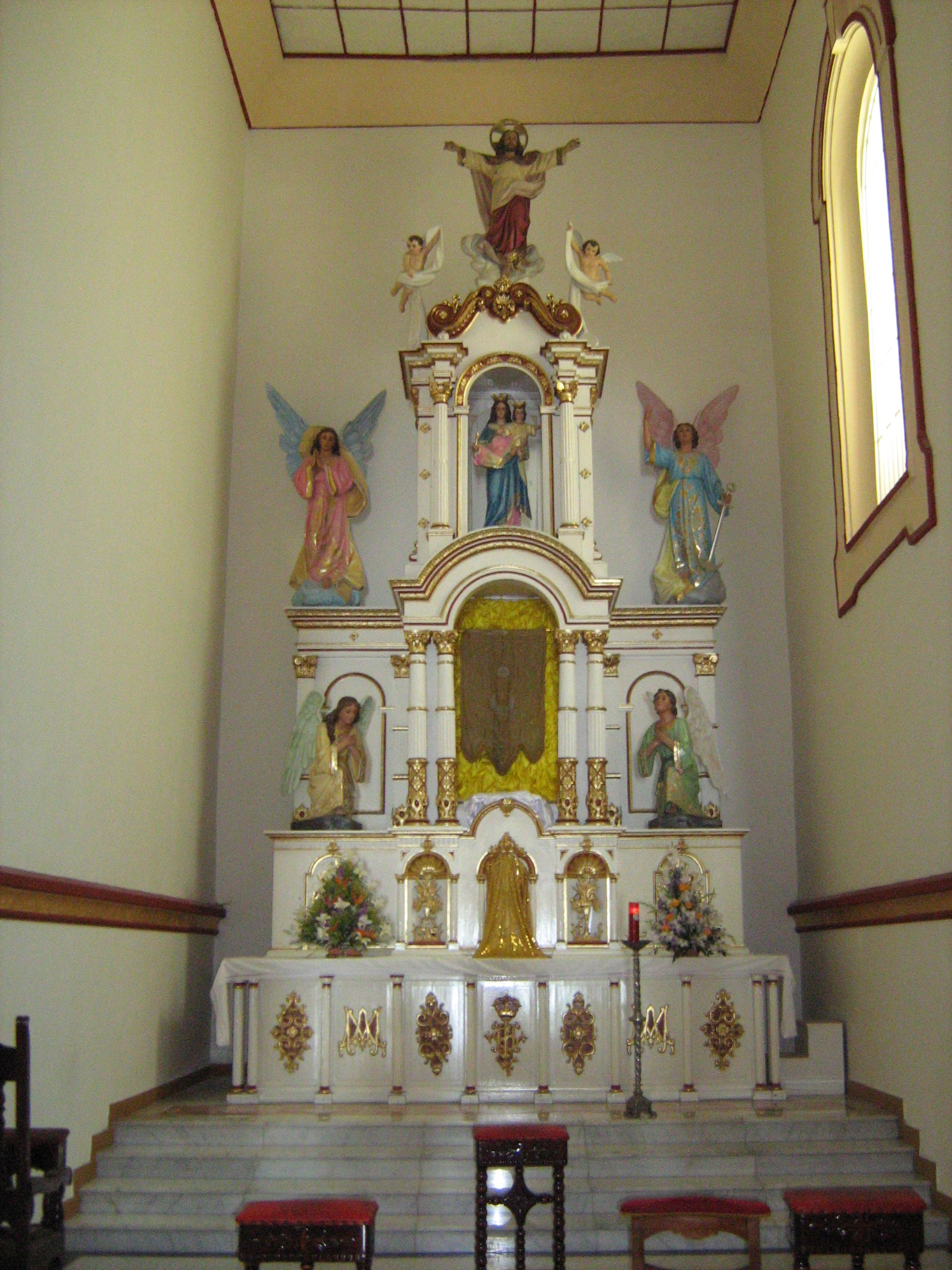 Altar de reserva de la Basílica de Yarumal, el cual sirvió por mucho tiempo como principal, actualmente está ubicado en el testero de la nave lateral derecha.